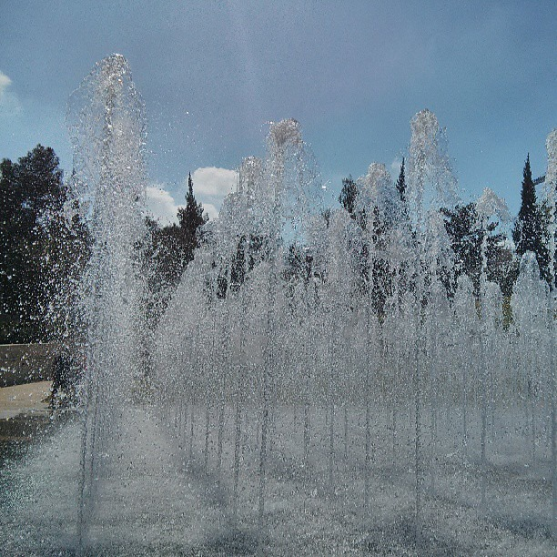 פארק טדי, ירושלים